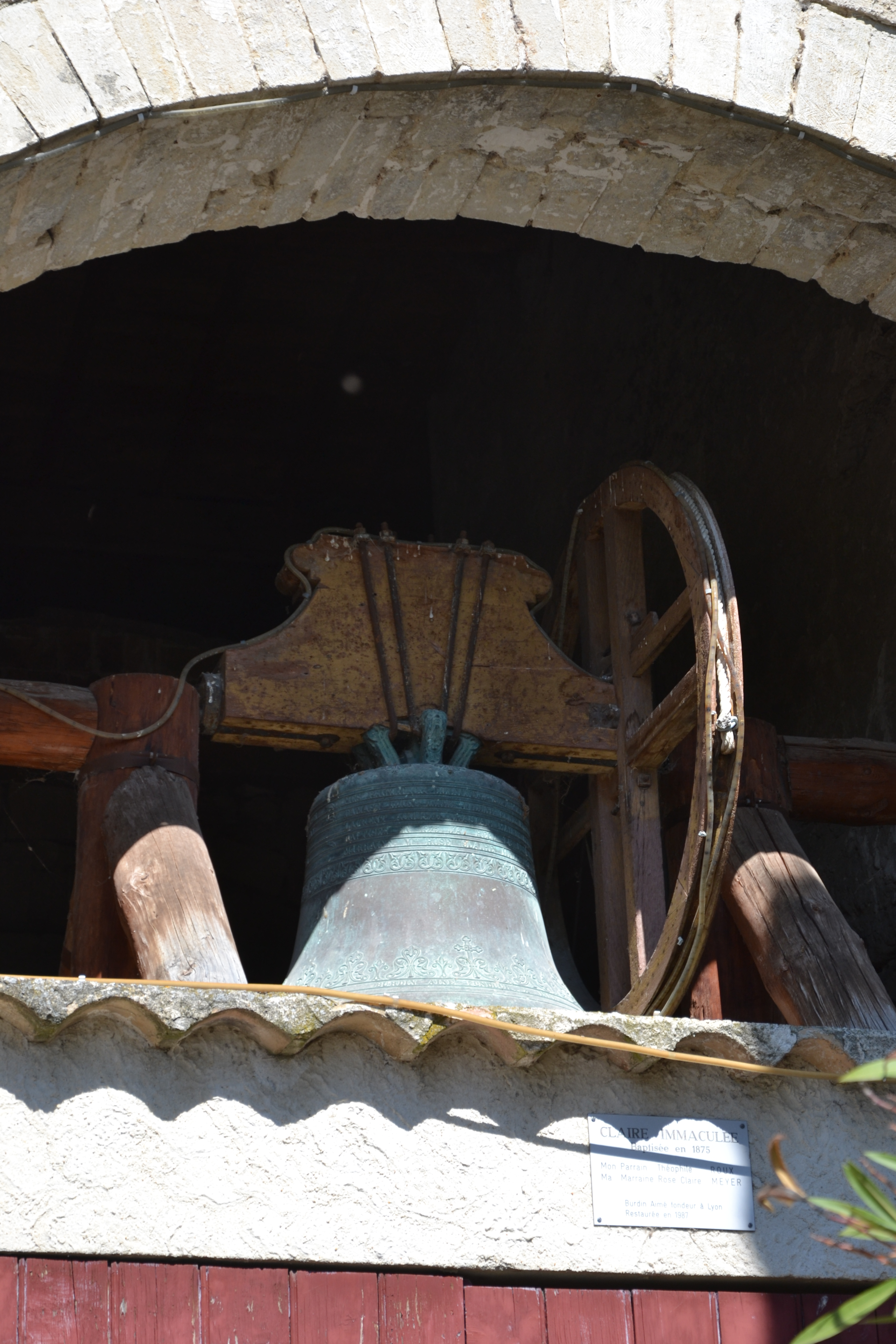 "Claire immaculée", cloche de l'église Saint-Blaise de Montbrison-sur-Lez, baptusée en 1875, du fondeur lyonnais Aimé Burdin